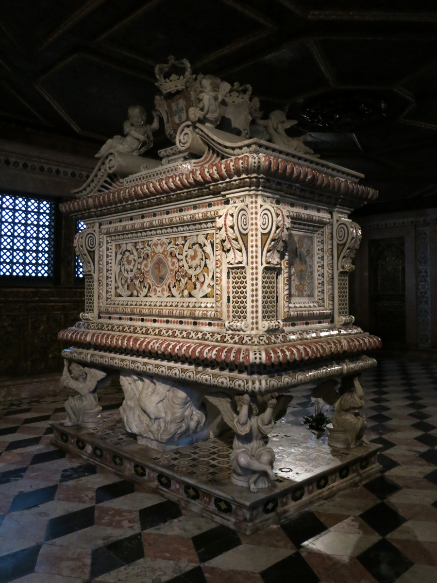 Túmulo da Princesa Santa Joana, Mosteiro de Jesus, Aveiro